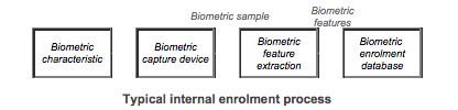 Procès d'enrolment